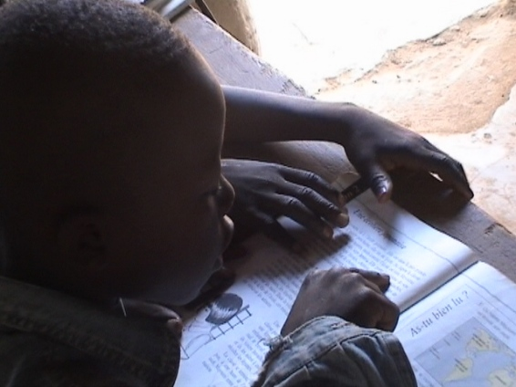 Écoliers au Mali. Photo d'Olivier EPRON